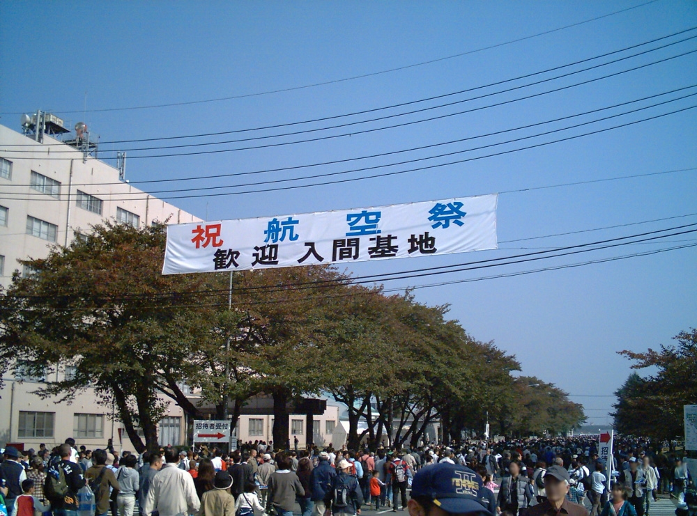 Iruma_Airbase_festival_2006 Japan